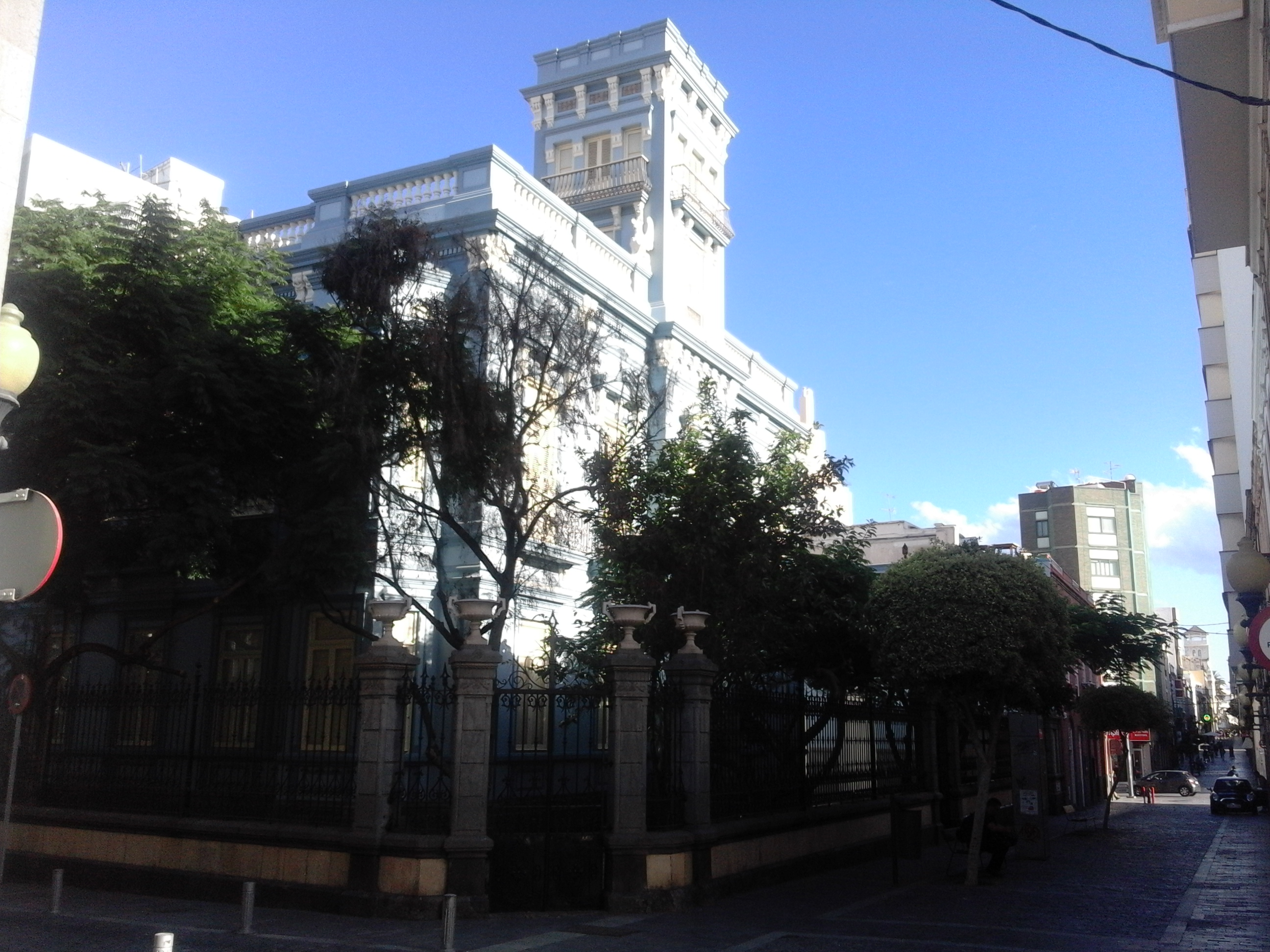 Palacete Rodríguez Quegles (Las Palmas de Gran Canaria)